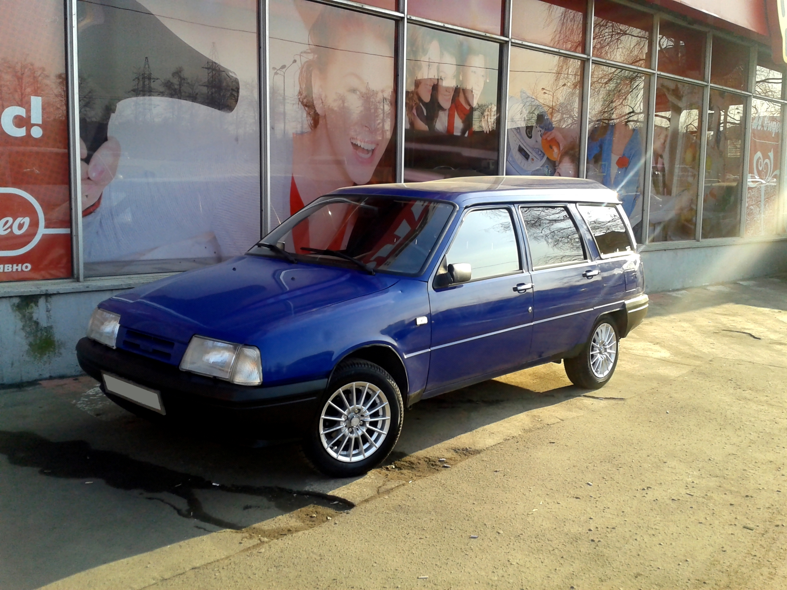 ИЖ-21261 "Фабула".